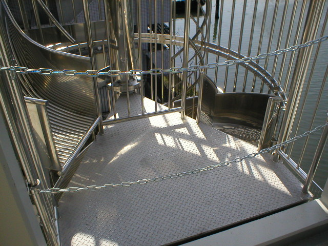 避難用滑り台の防犯対策の一例